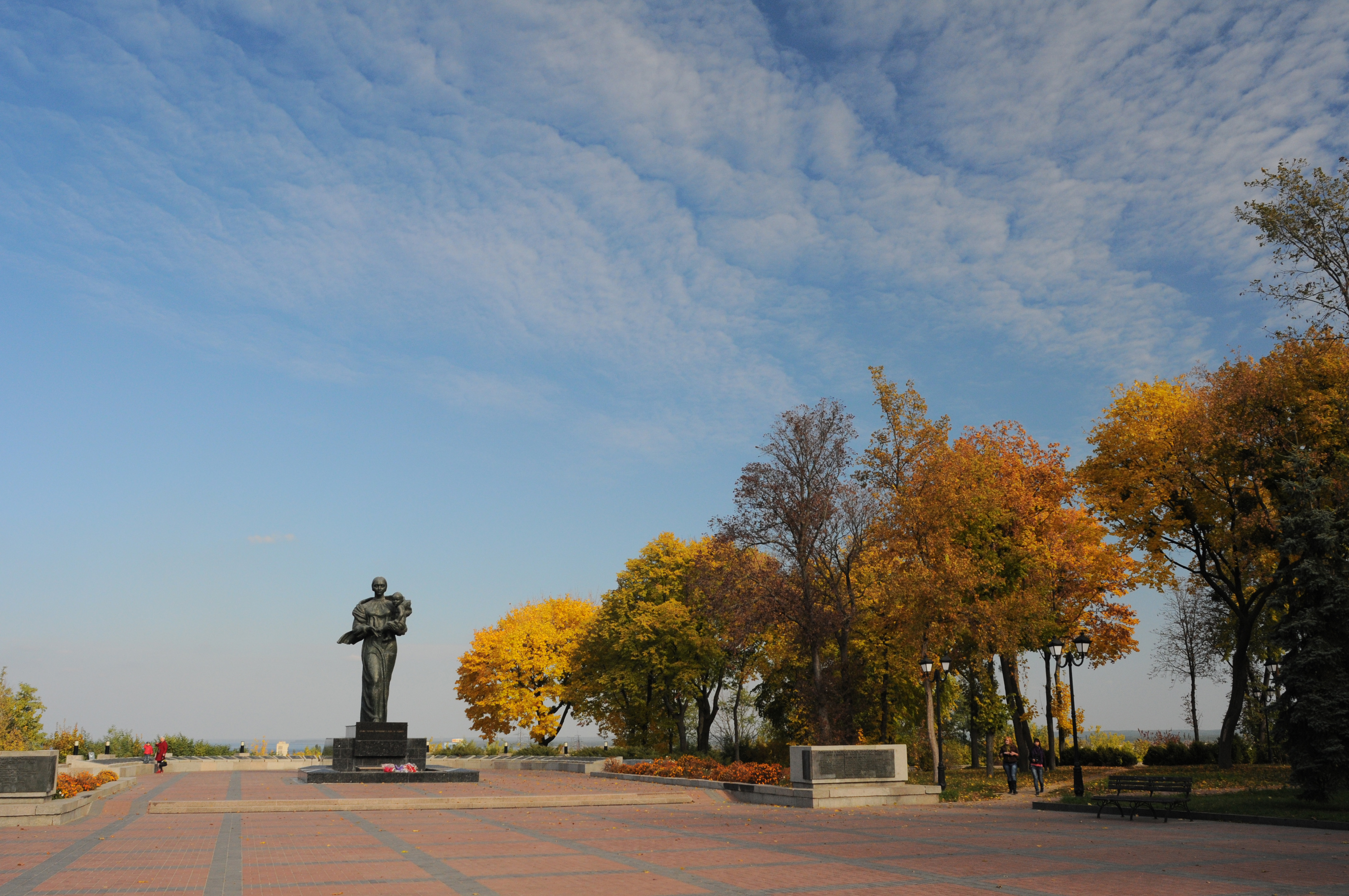 Канів, меморіал